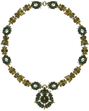 Colar da Ordem Militar da Torre e Espada, do Valor, Lealdade e Mérito